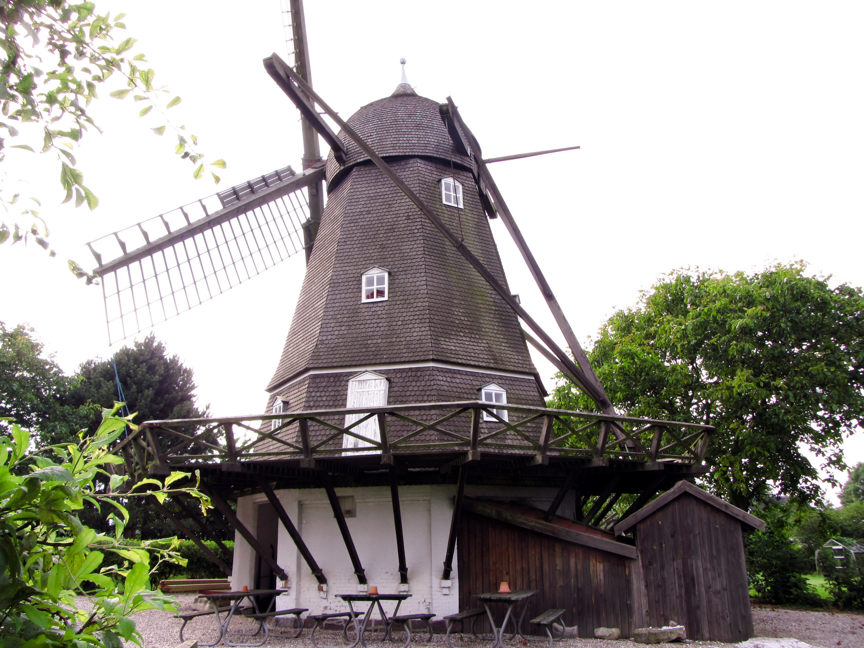 Ølsemagle Mølle, Galerieholländermühle